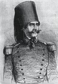 M. le chevalier Raffo Gravure imprimée sur papier représentant Giuseppe Raffo, 26 x 37 cm L'Illustration. Journal universel, n°193, 7 novembre 1846